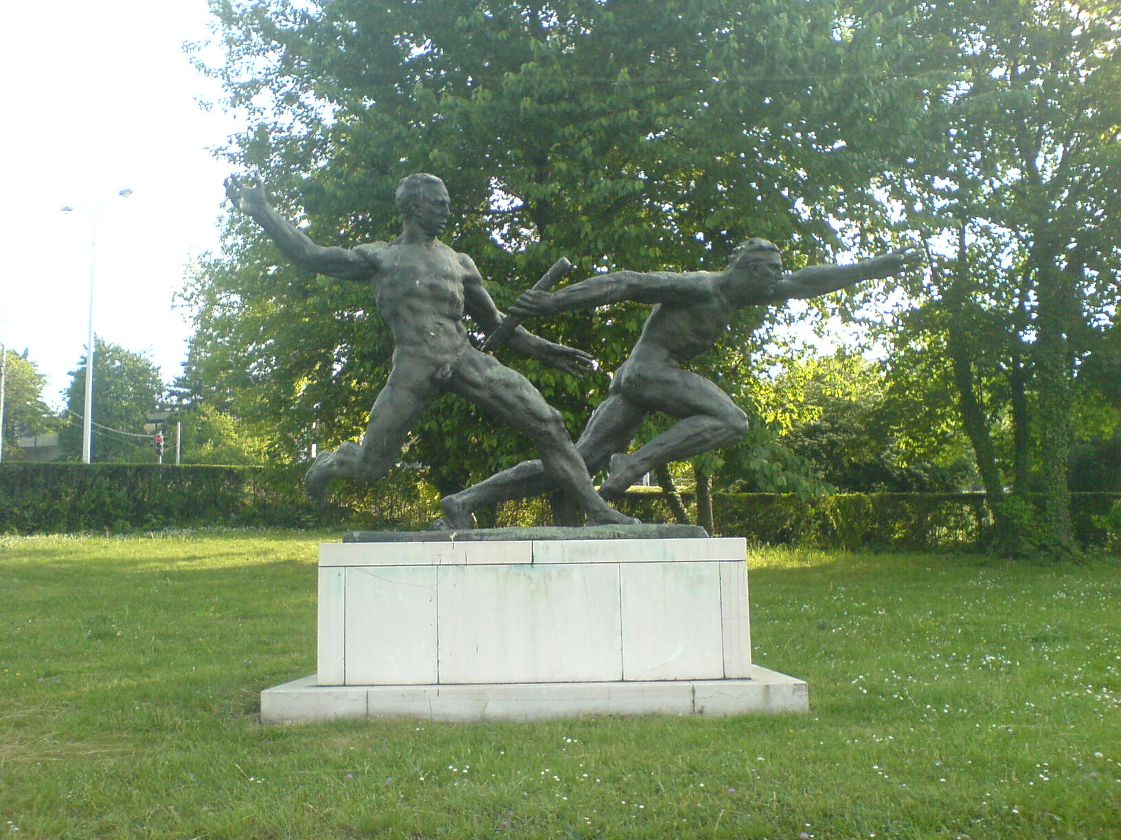 Споменик носиоцима штафете младости, испред улаза у стадион ФК Партизана. Licensing